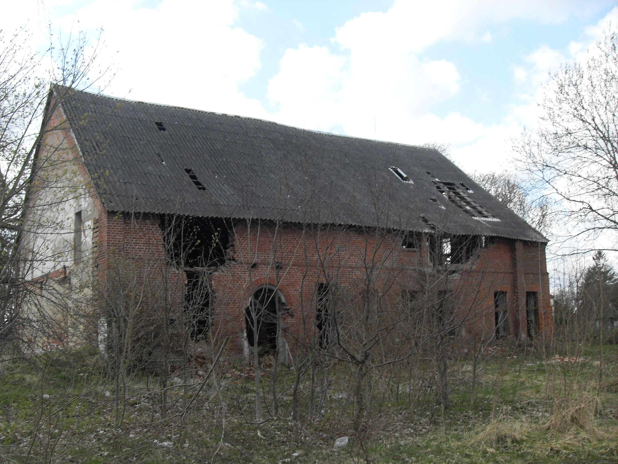 Gut Sternin